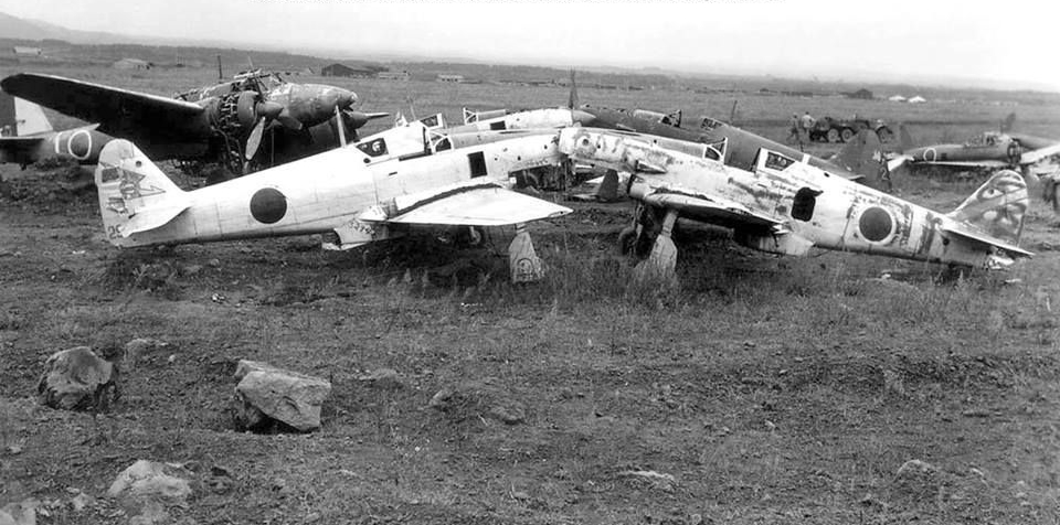 Ki-9도 배치되어 있었다고 함